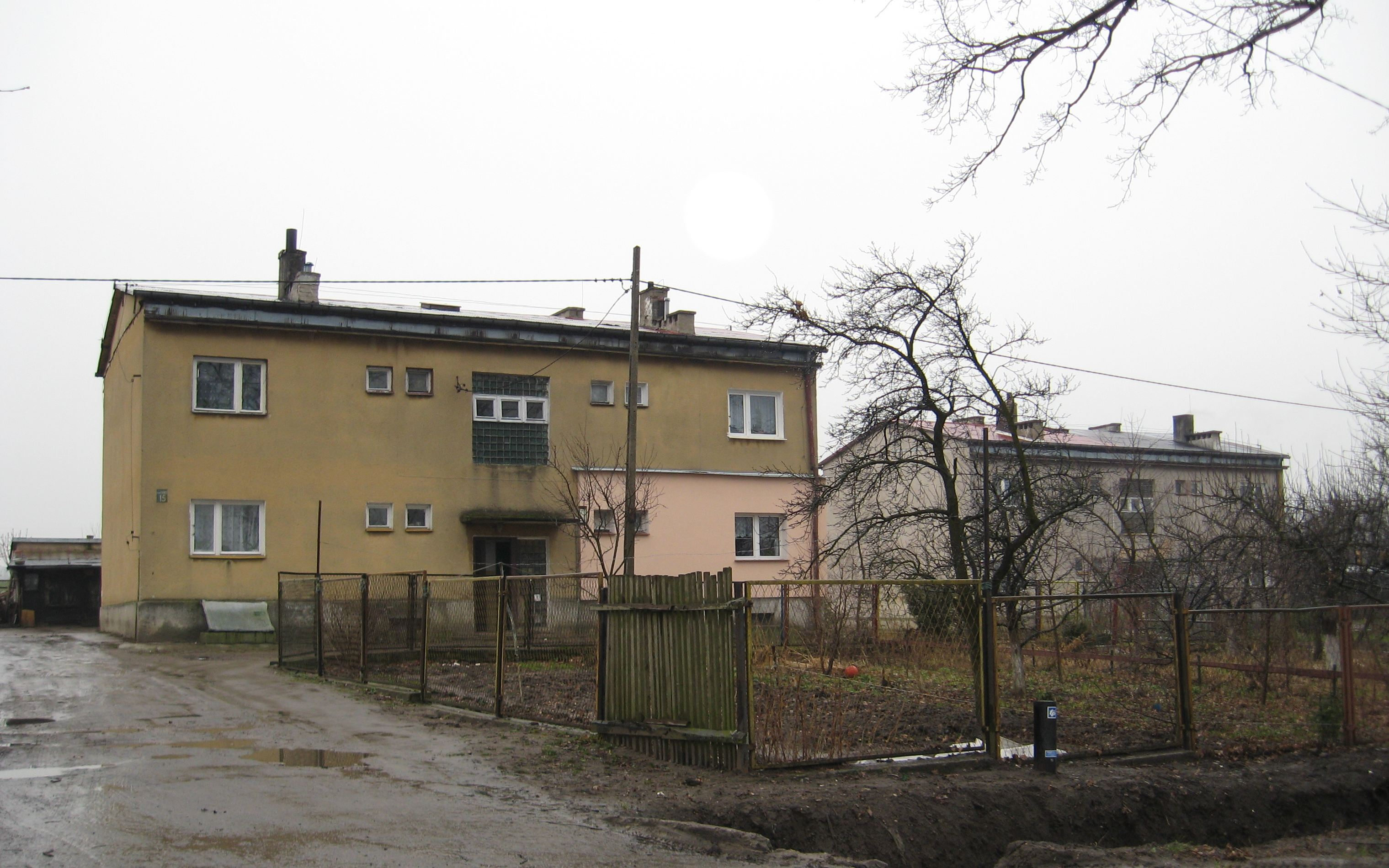 Rodele